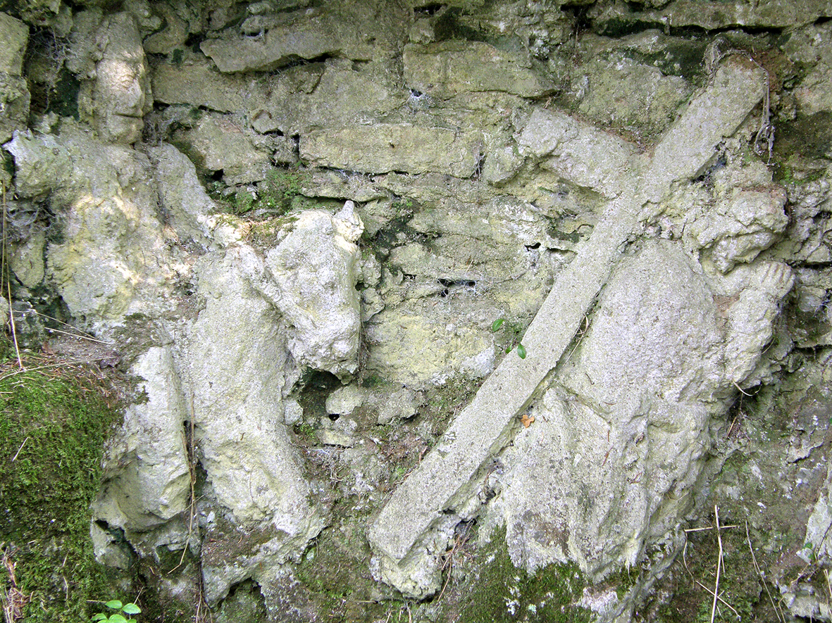 Allée du Rosaire à Warre